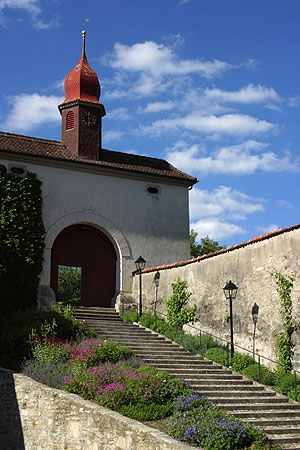 Schloss Liebegg